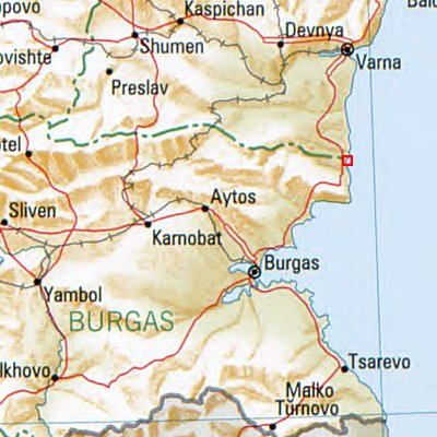 Obsor - Lage des Ortes in Bulgarien